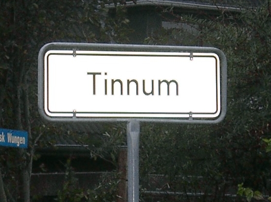 "Großstadtambitionen" der Gemeinde Sylt oder ein Zeichen der baulichen Einheit von Westerland und Tinnum.